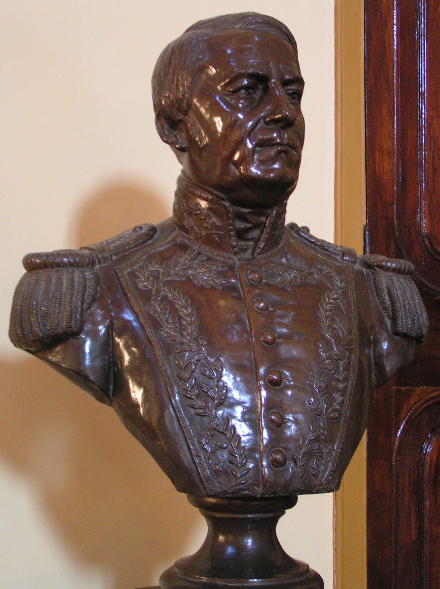 Busto de Pedro Ferré, ca. 1928. Autor desconocido. En el Salón Dorado de la Casa de Gobierno de Corrientes